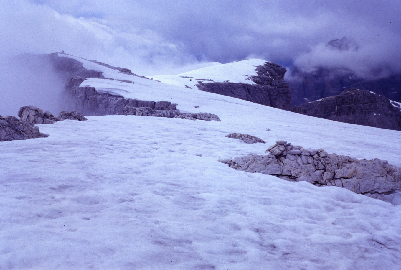 Popera, vetta m 3046, sulla vetta fu trasportqto un cannone; Antonio Berti ha scritto: "Il cannone che sparava dalle stelle"